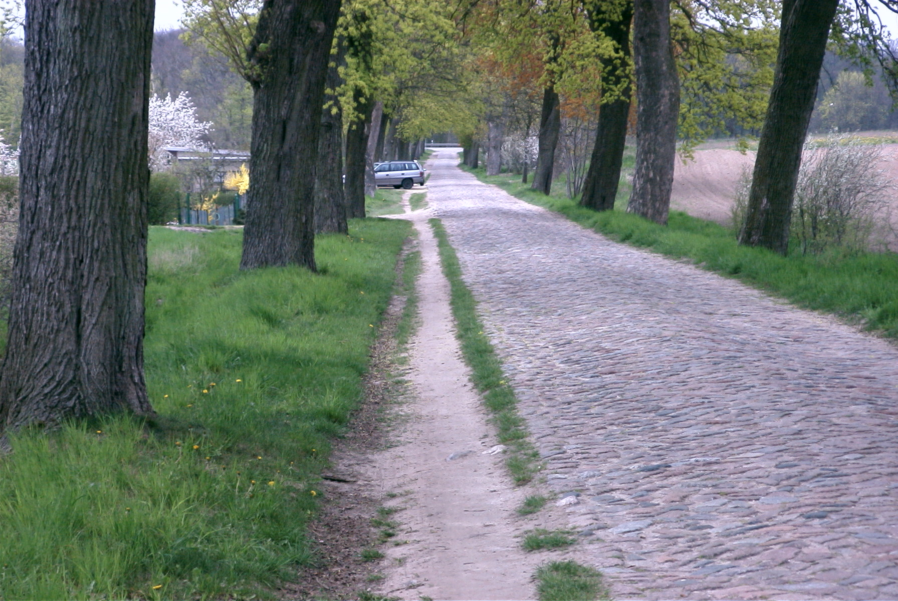 Fährdamm zur Gützkower Fähre nach N